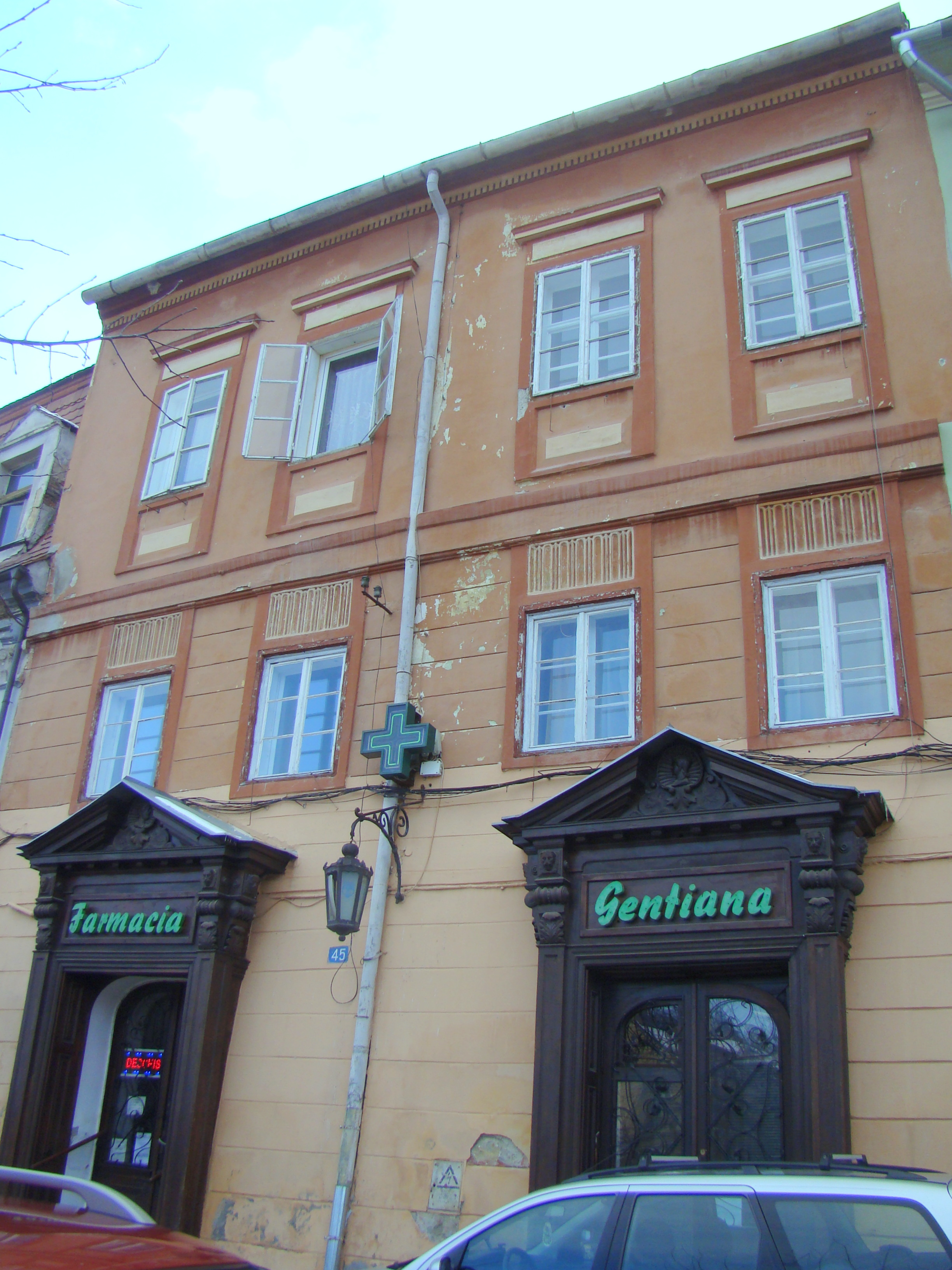 Casa Weber, municipiul Sighișoara, Piața Oberth Hermann 45 1600 - 1676, sec. XIX